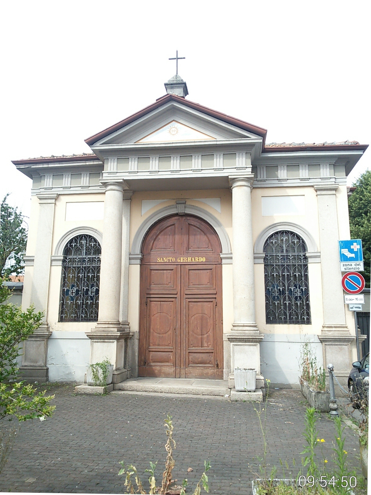 Chiesa (cappella) dell'ospedale vecchio